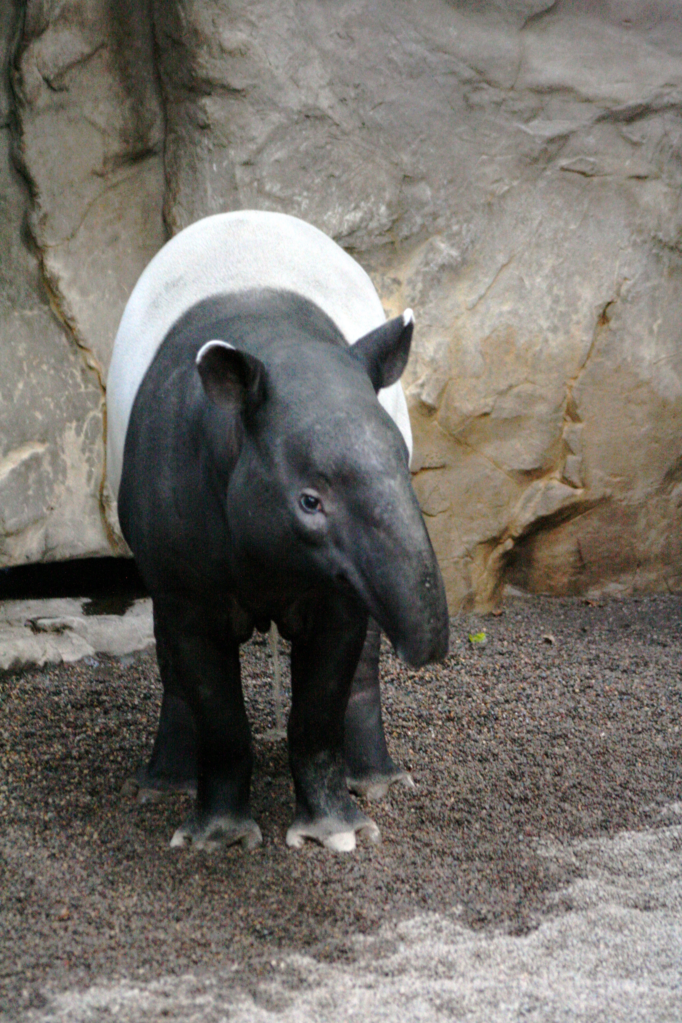 Malayan tapir, Tapirus indicus